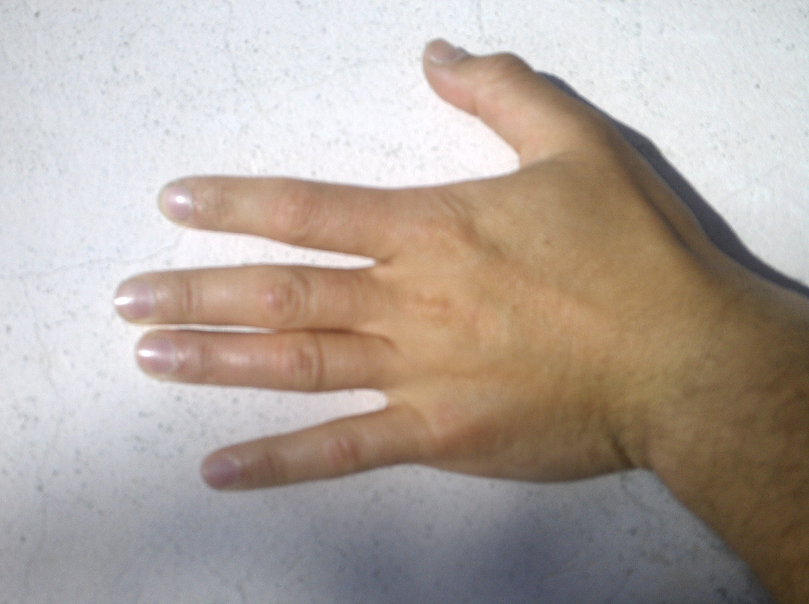 mano